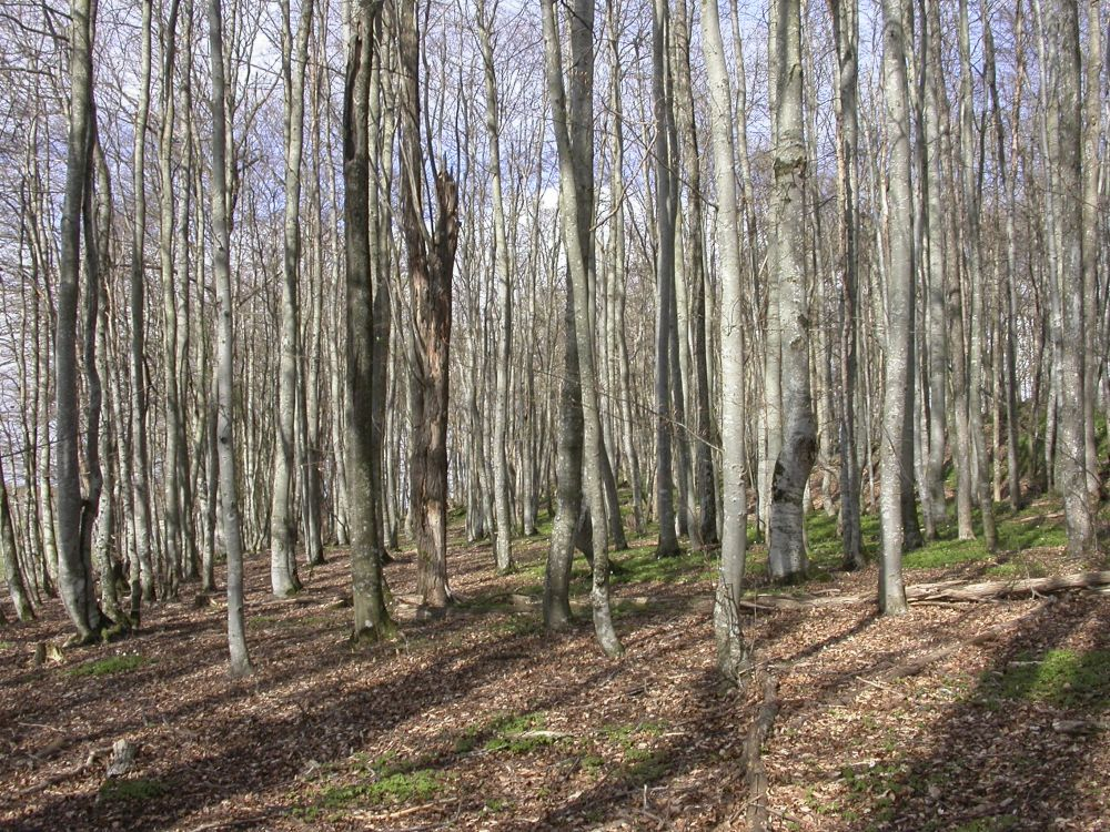 Vår i Våle prestegårdsskog. Hvitveisen må skynde seg å blomstre før bladene på trærne stenger lyset ute.